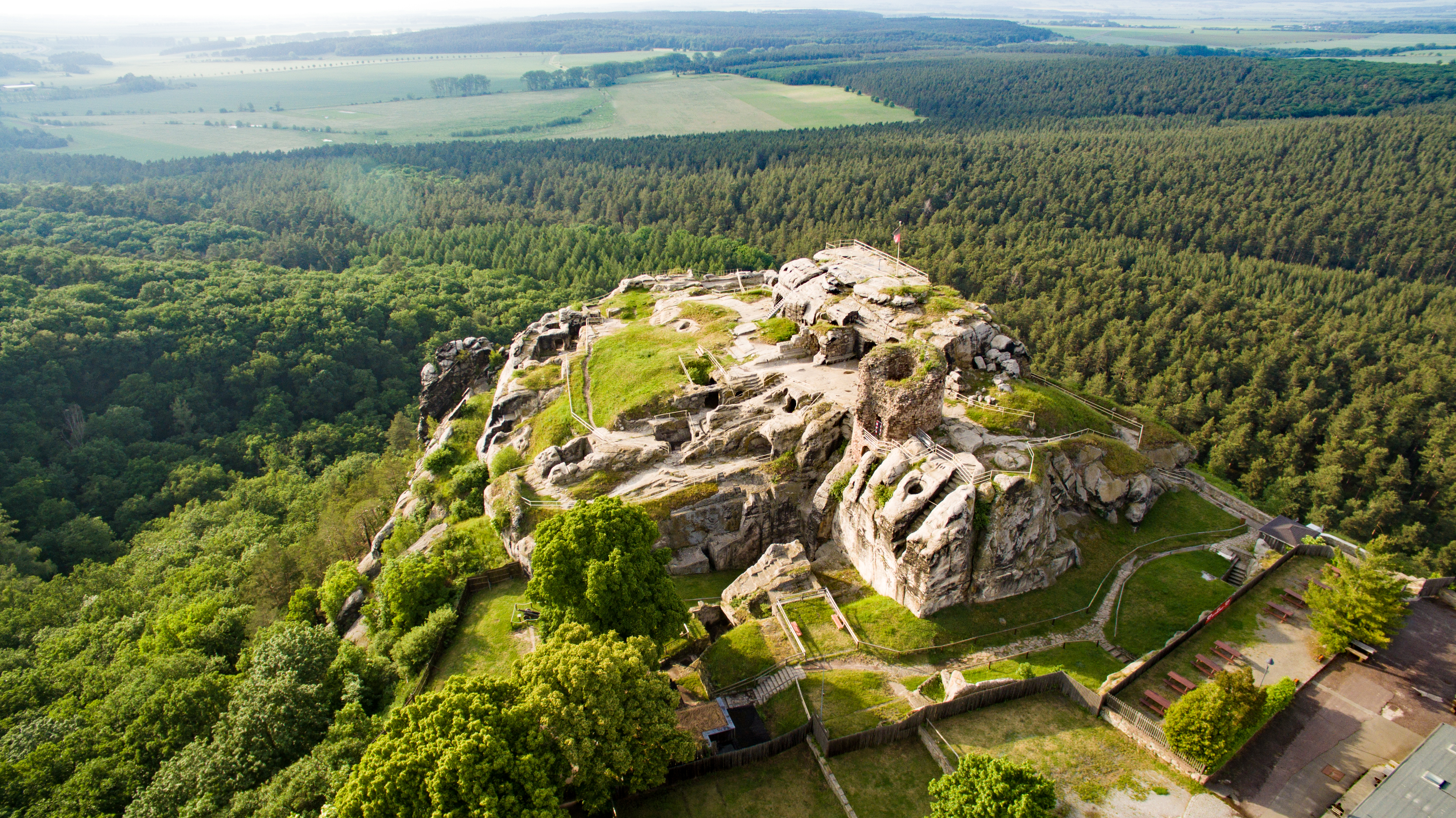 Burg Regenstein nahe Blankenburg (Harz)